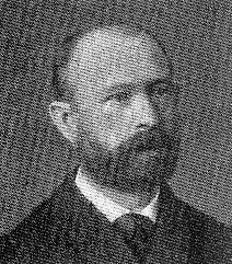 Josef Köferl (1845 - 1918), Český spisovatel, básník a regionální historik.